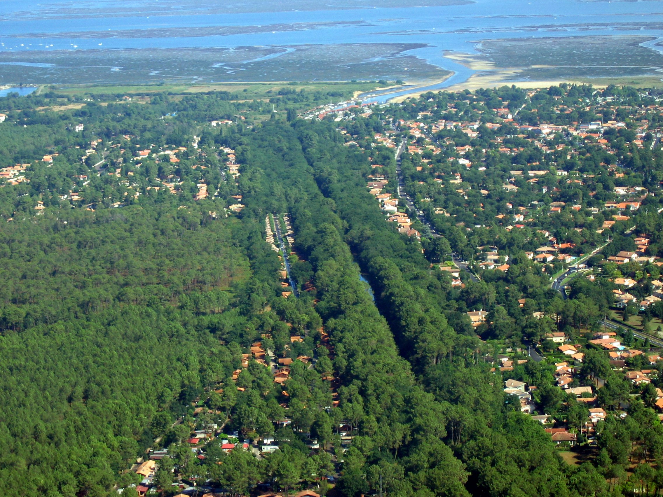 Photo personnelle, le canal de Cazaux débouchant dans le Bassin d'Arcachon. Eté 2005